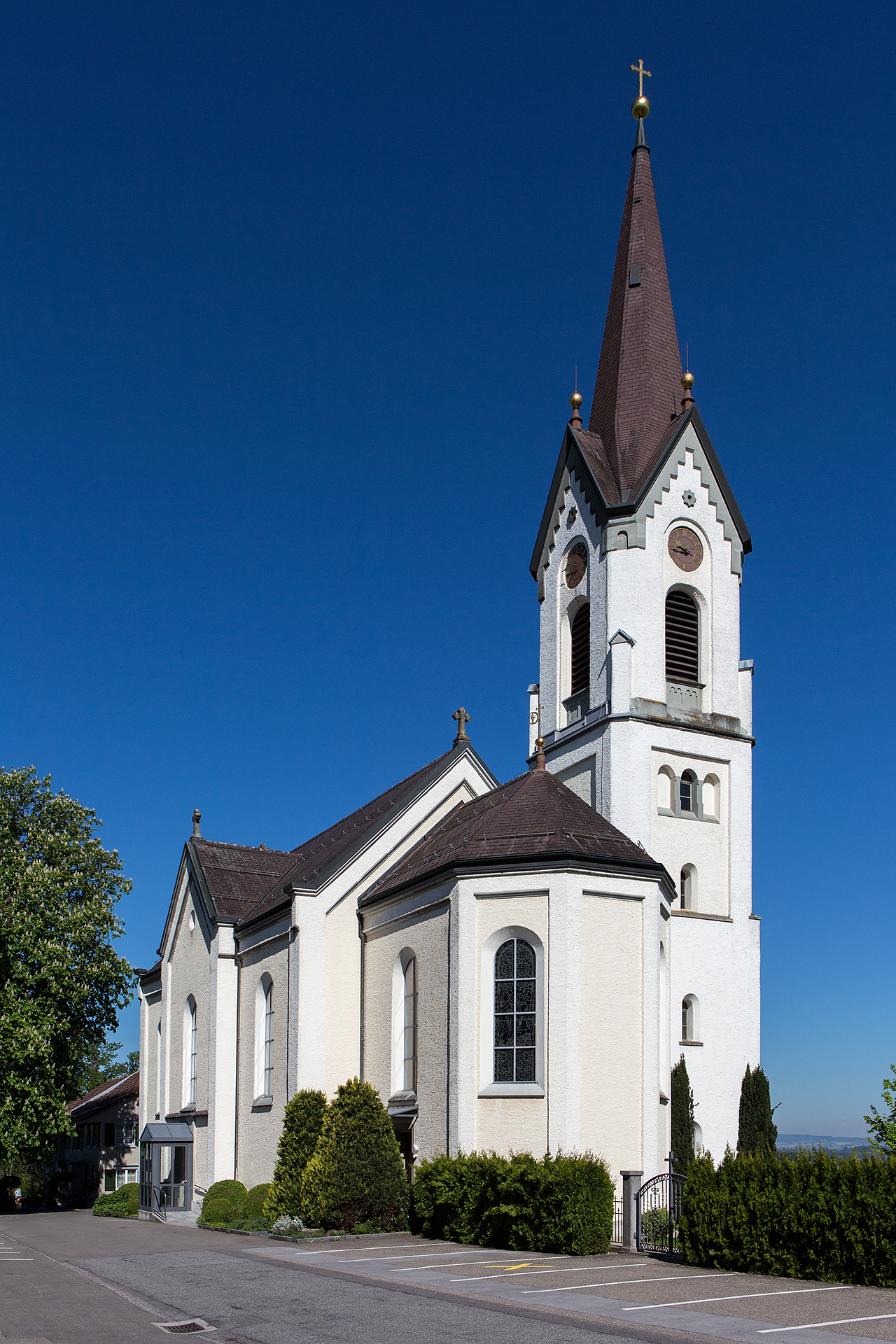 Katholische Wallfahrtskirche St. Pelagiberg in der Gemeinde Hauptwil-Gottshaus (TG)